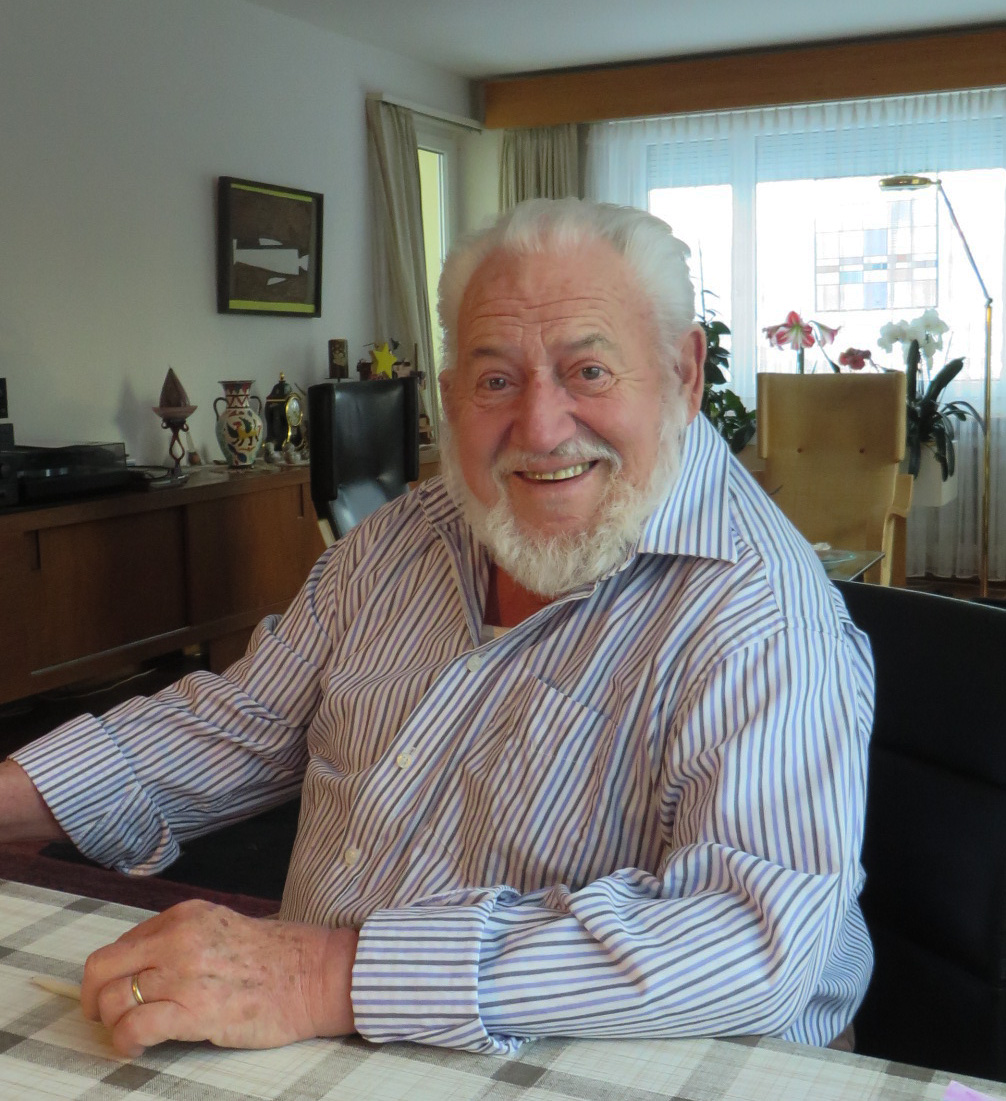 Foto von Alfons Weisser (Schweizer Architekt), 84 Jahre alt